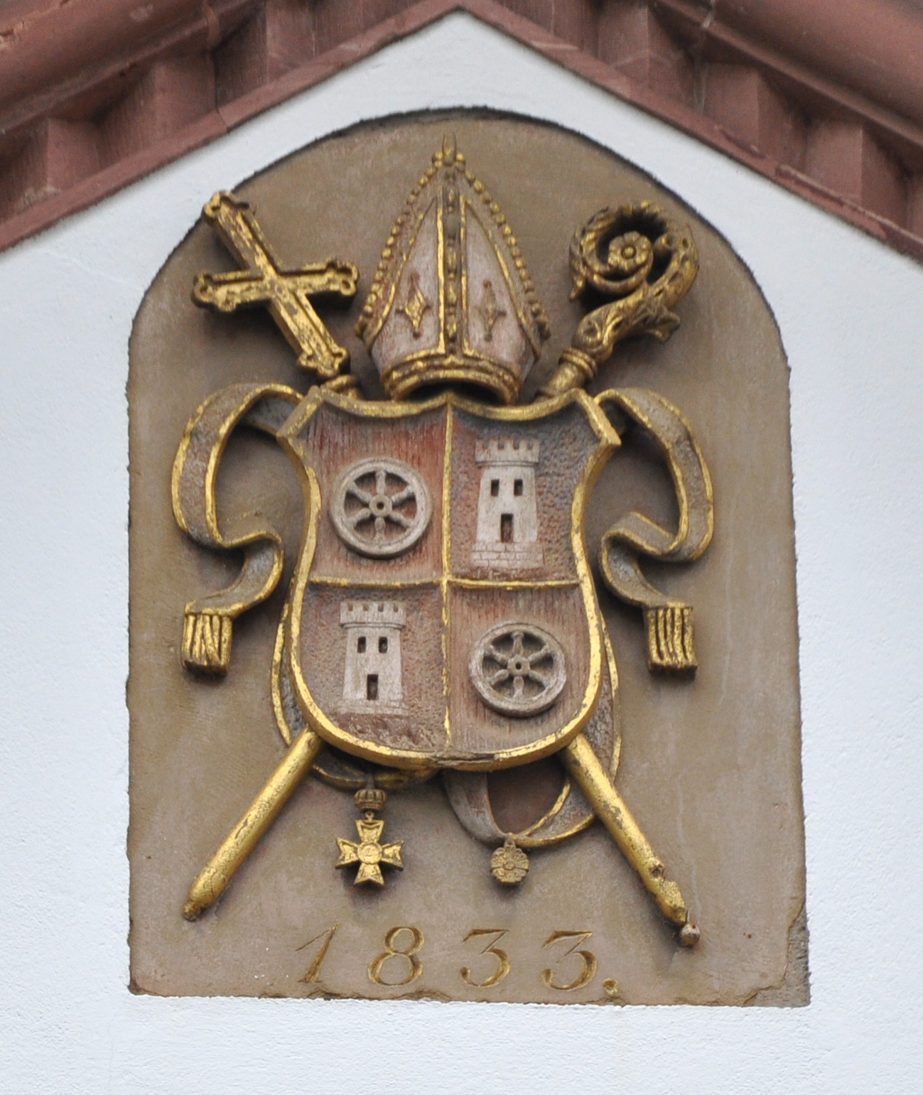 Mainz, Häuser um den Dom, hier: Schöfferstraße, Wappen des Bischofs Joseph Vitus Burg, 1833 siehe auch